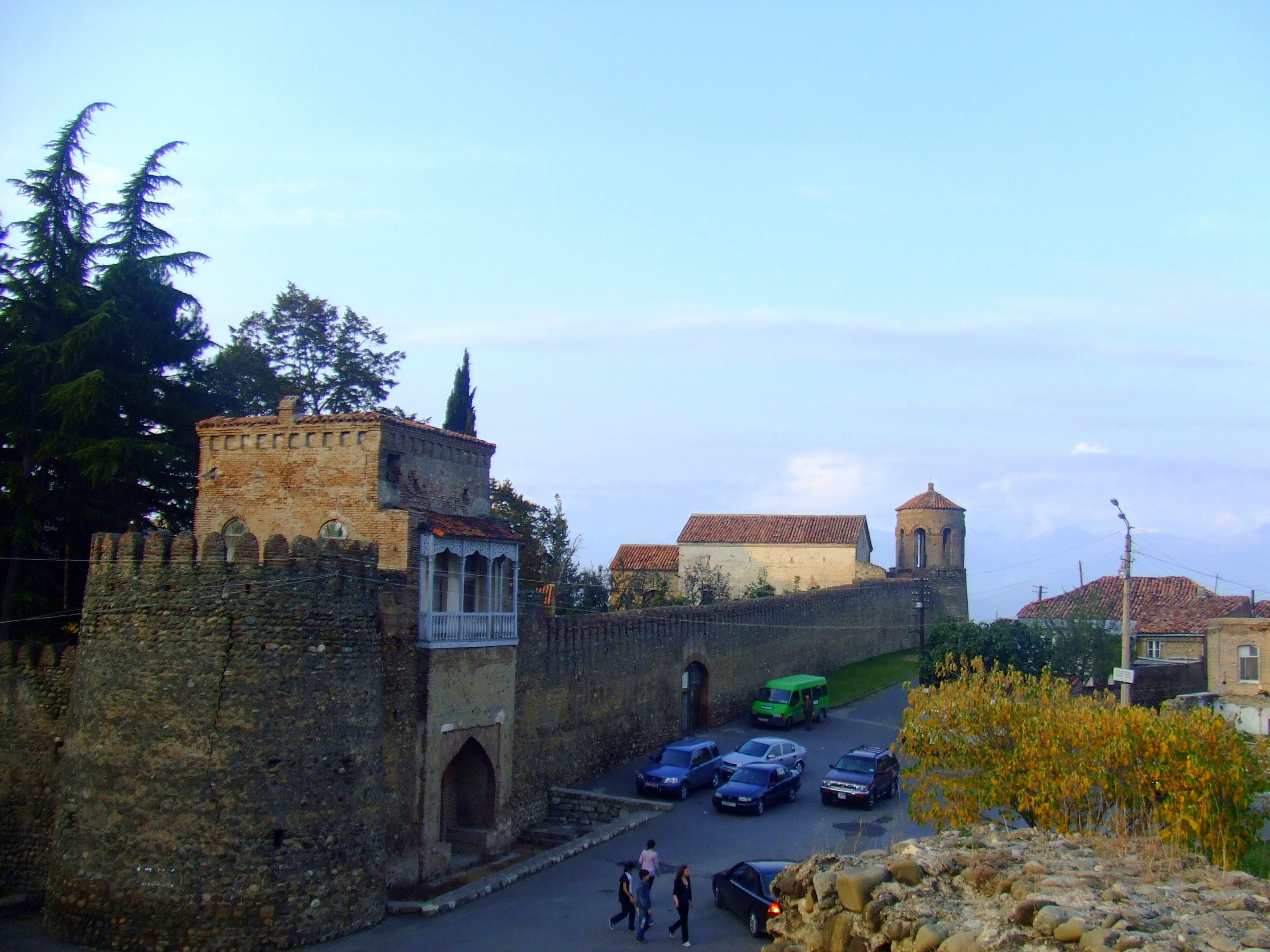 Telavi